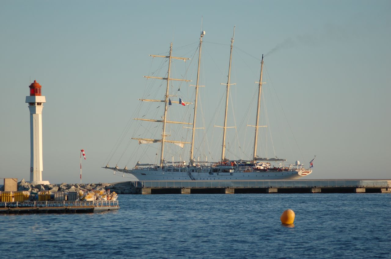 Le Star Clipper au phare du Vieux-Port de Cannes (bateau identifié selon son itinéraire de "Star Clippers")